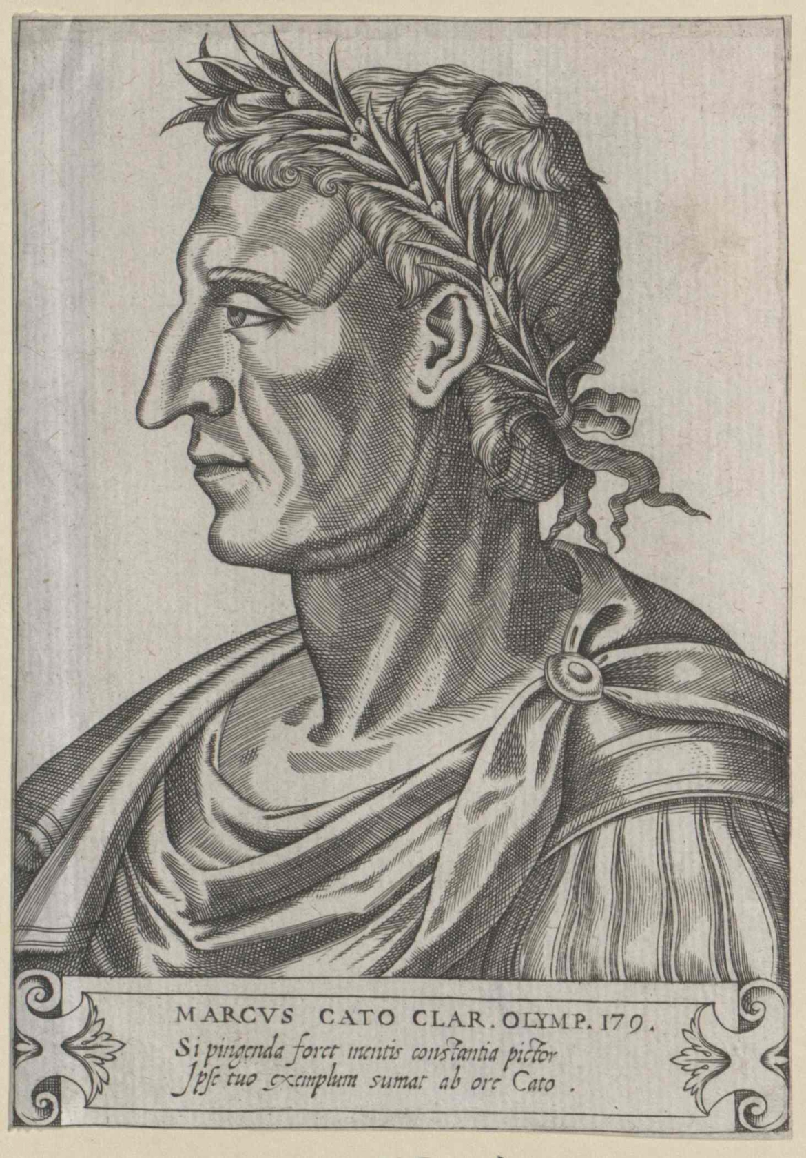 Cato, Marcus Porcius (234 v Chr - 149 v Chr